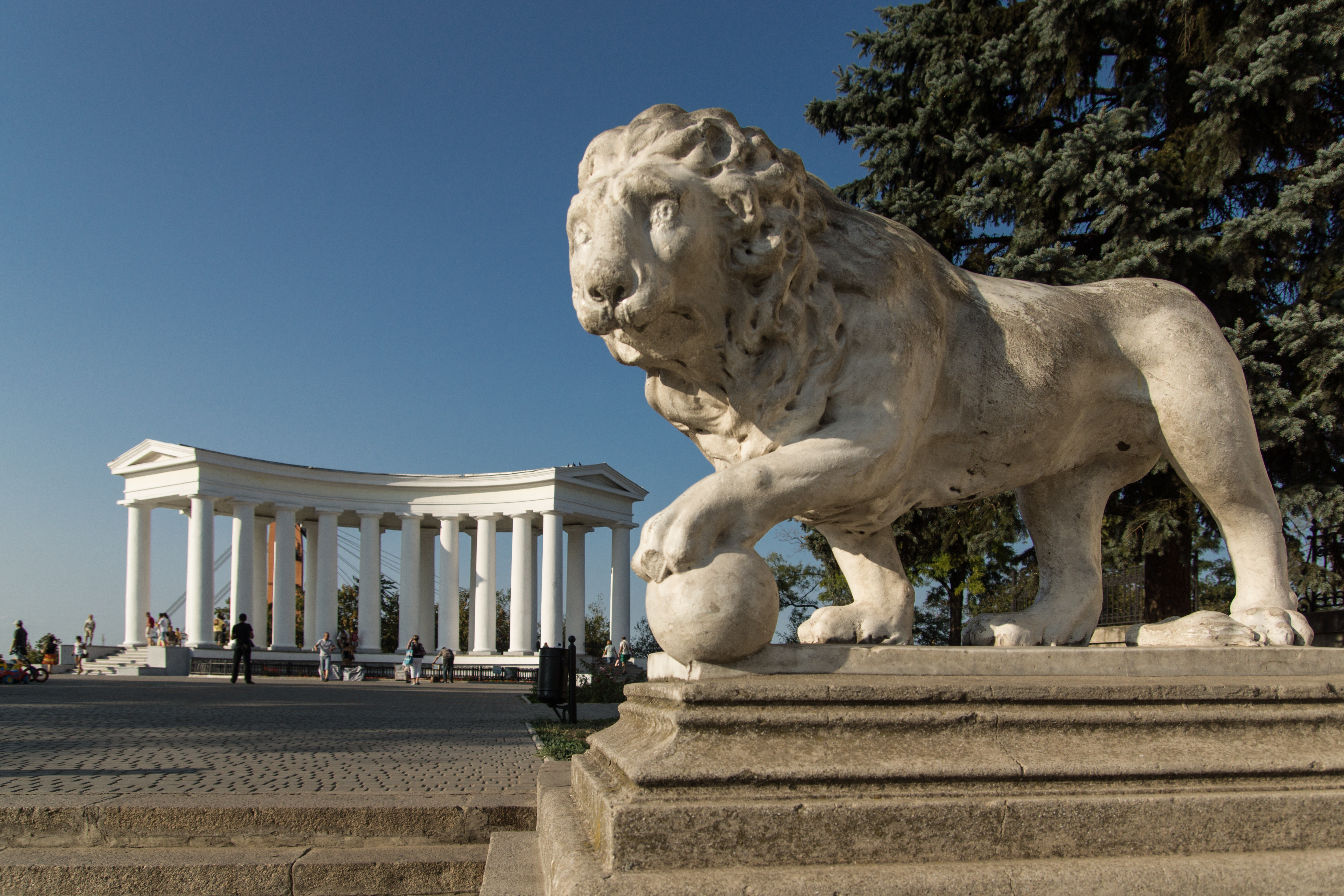 Ансамбль Воронцовського палацу. Бельведер (колонада)., Одеса, Воронцовський пров., 2